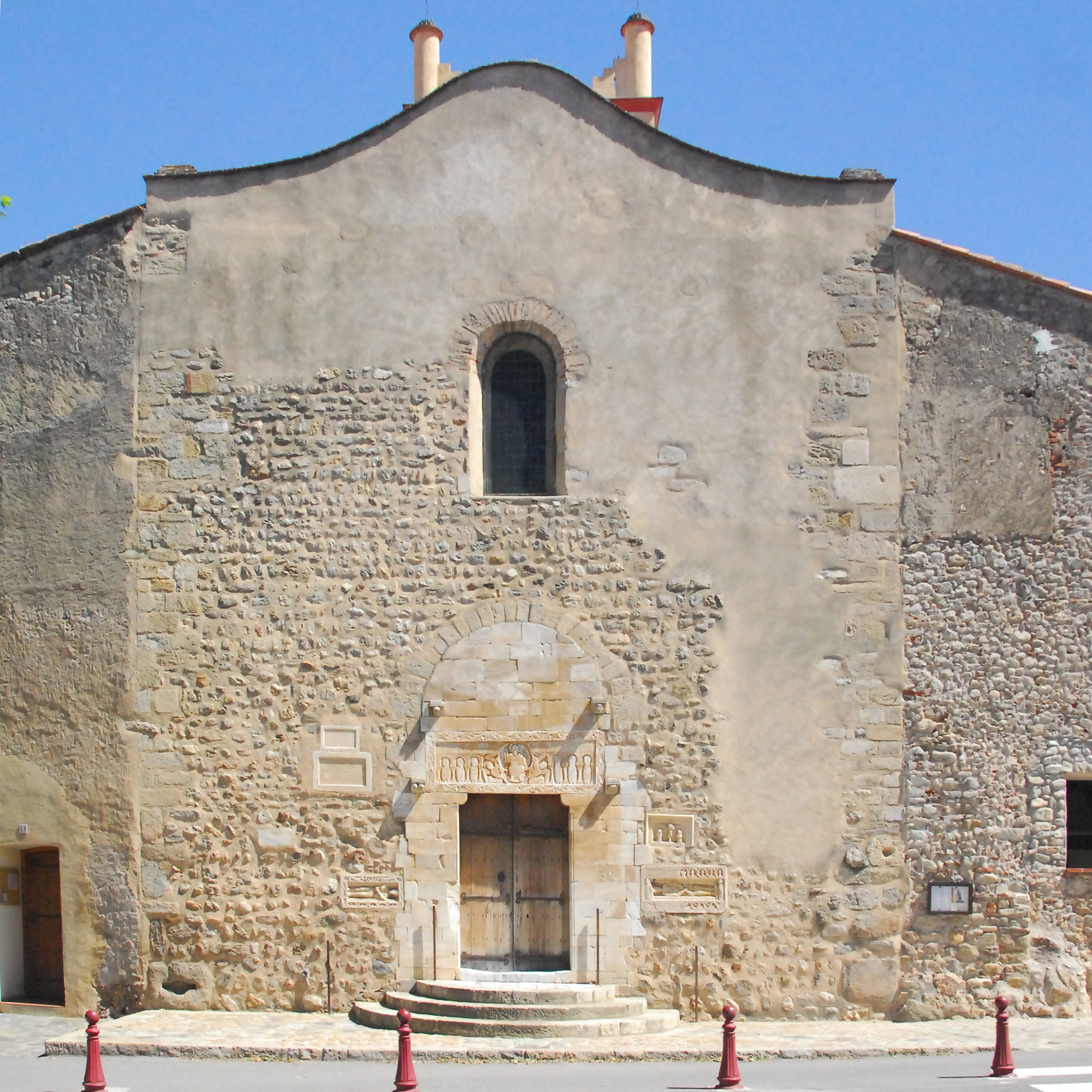 Abtei St-Génis-des-Fontaines, Fassad von W